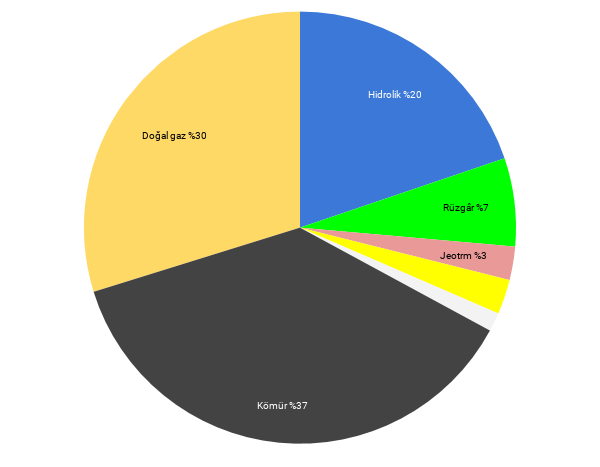 Kaynak